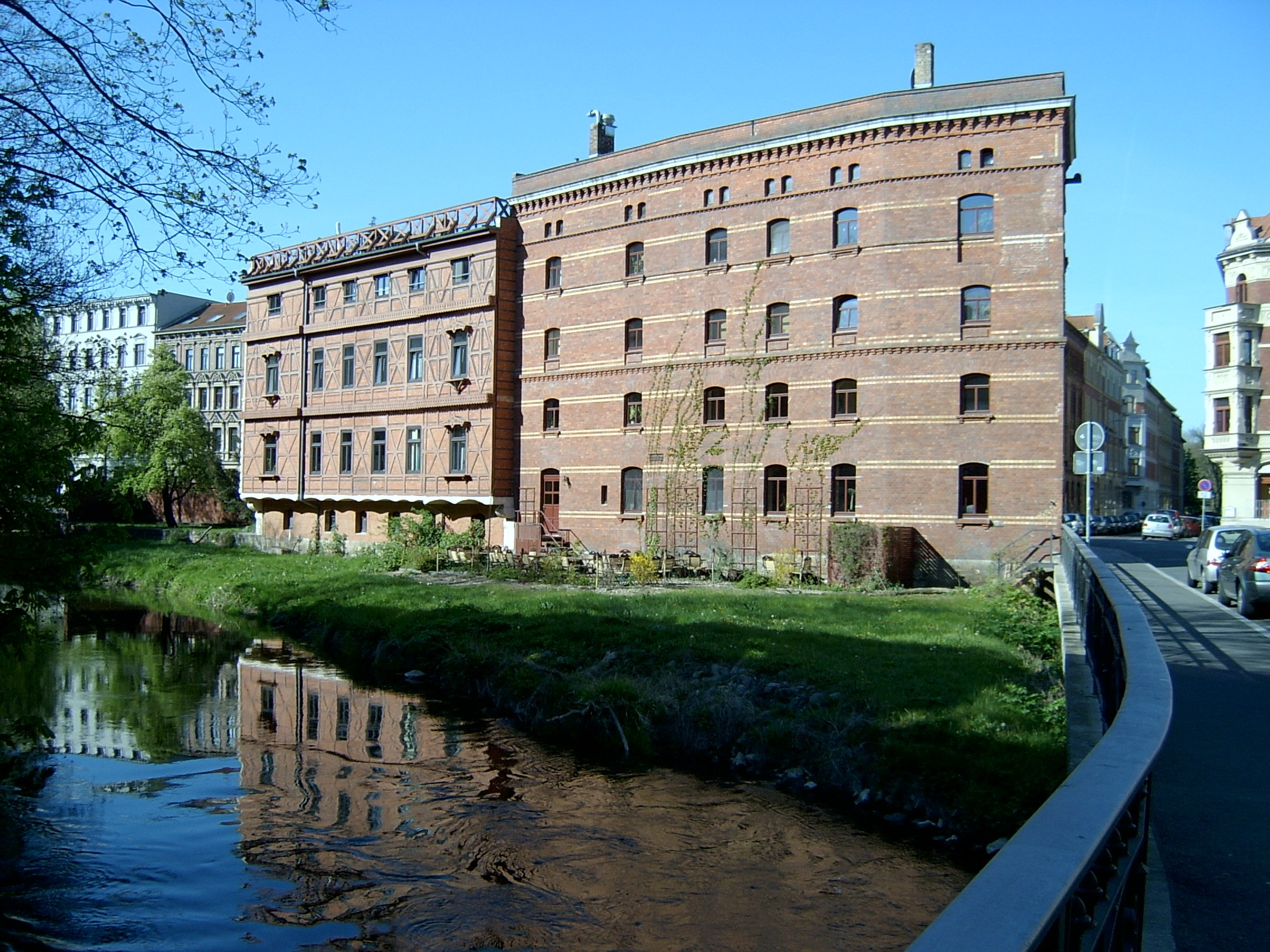 Ehemalige Ronneburger Mühle an der Mühlpforte Ecke Robert-Franz-Ring in Halle (Saale) (Anschrift: Robert-Franz-Ring 21-22)